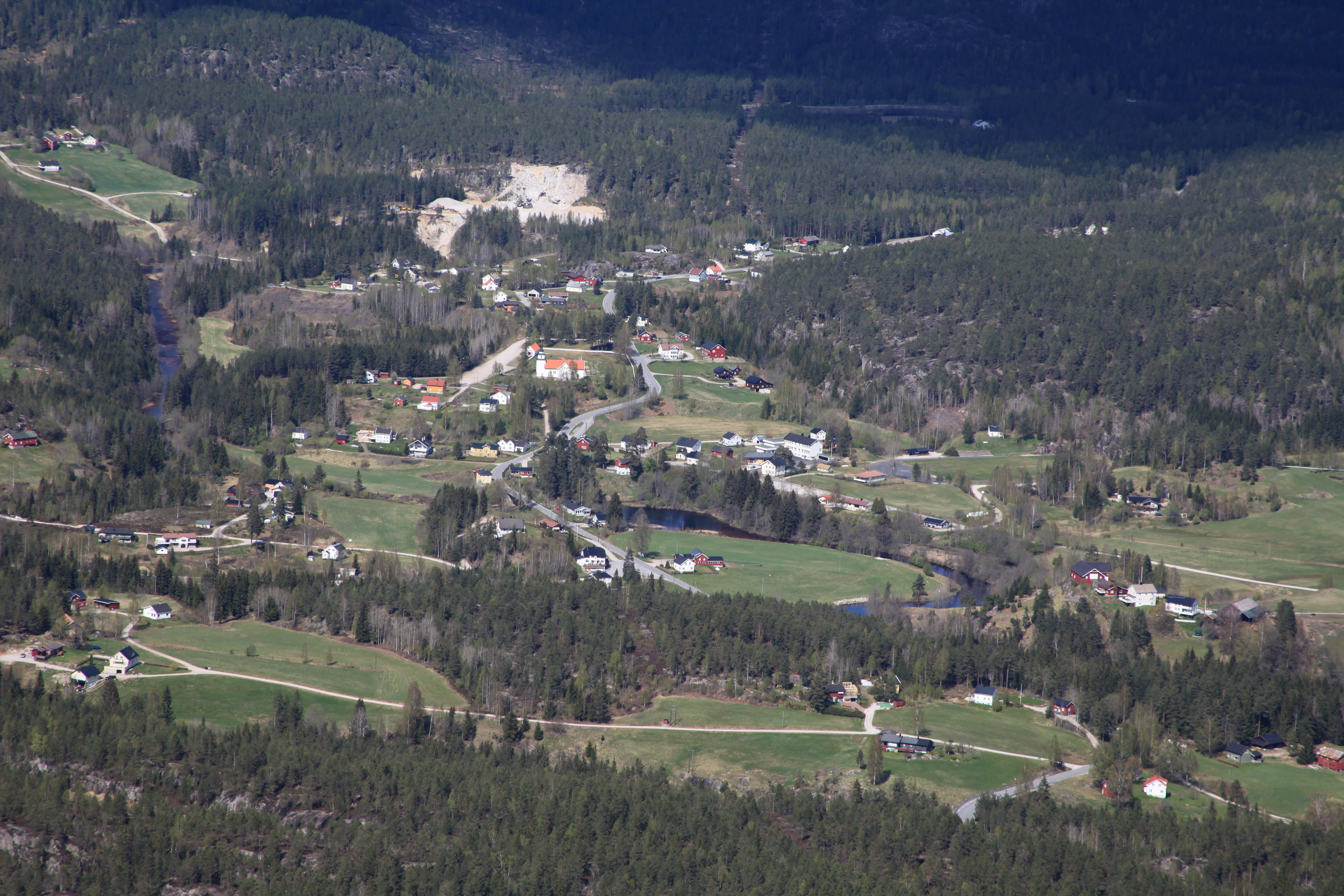 Bø i Tørdal.